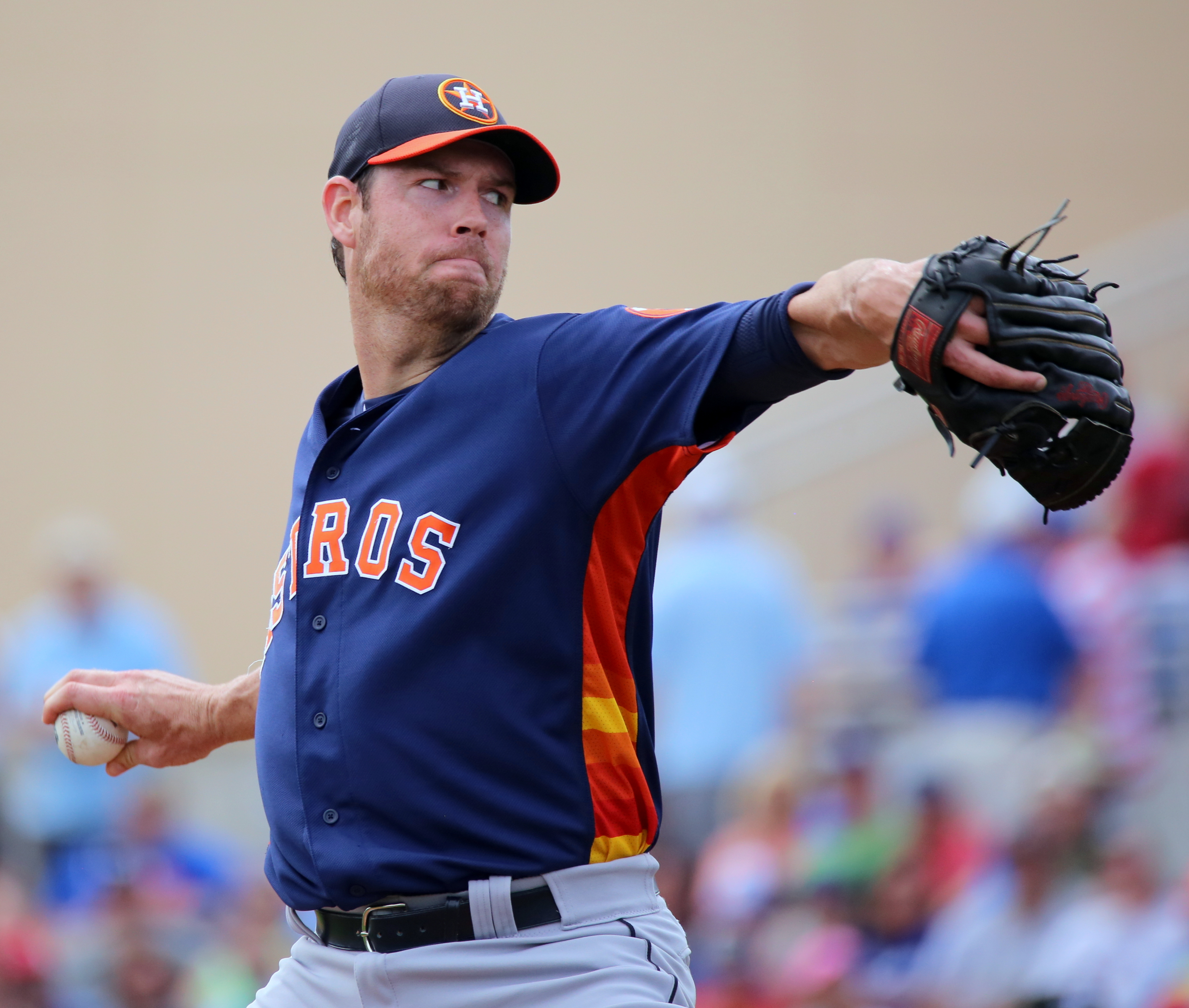 Doug Fister